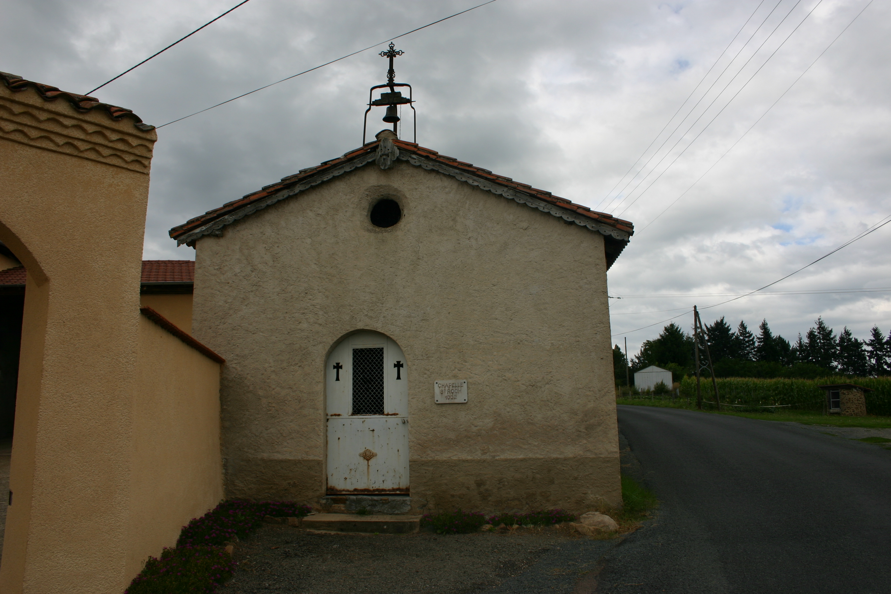 La chapelle Saint-Roch sur la commune de Bussières dans le département de la Loire.